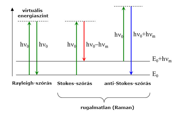 Raman szórás összehasonlító ábra